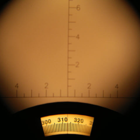 Abbildung eines Bildes durchs Marineglas, die senkrechte und waagerechte Strichplatte sind zu erkennen. Fernglas Typ "Compass Aqua 7X50"